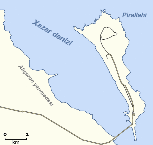 Pirallahı yarımadasının məhəlli xəritəsi